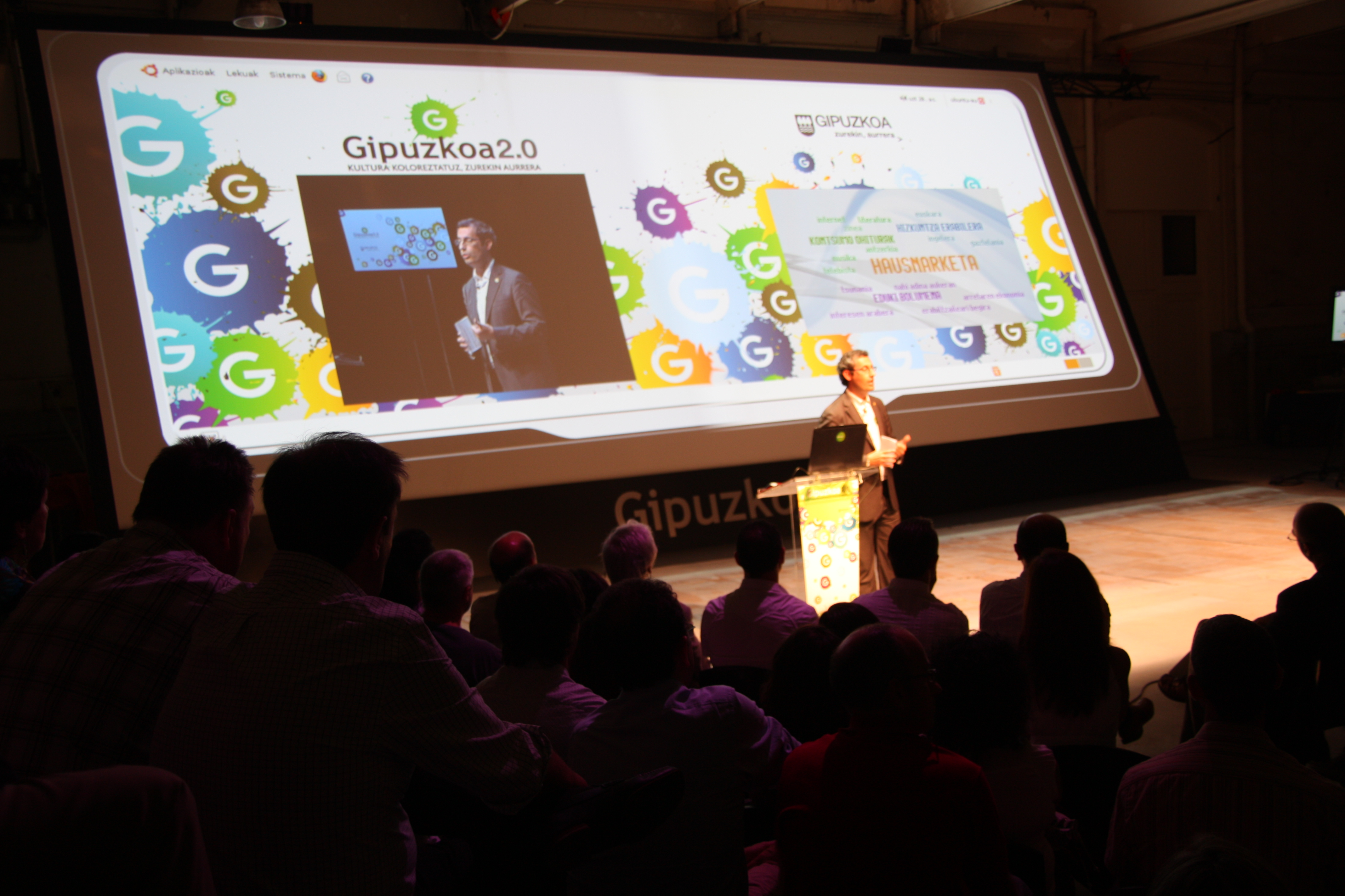 Gipuzkoa 2.0 ekimenaren aurkezpena Gipuzkoako Foru Aldundiko Markel Olano Ahaldun Nagusiaren eskutik Donostiako Tabakaleran.